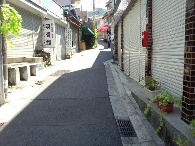 東大阪市石切の街並み